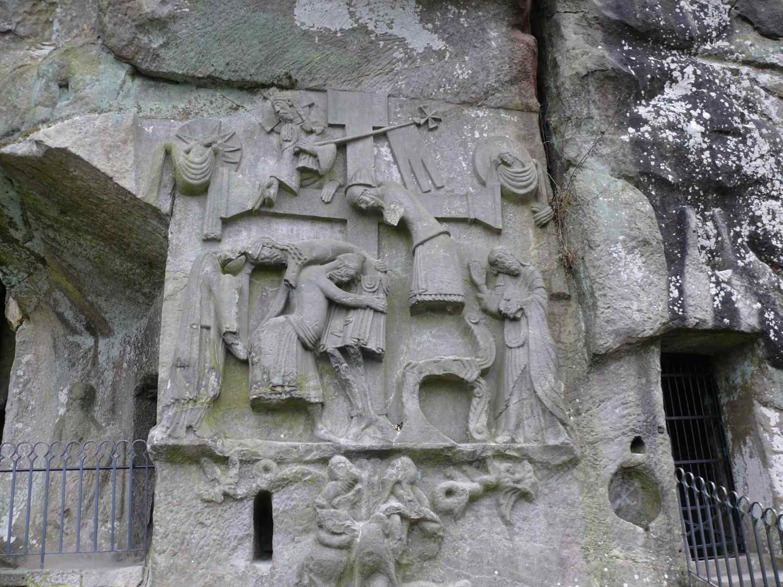 Kreuzabnahmerelief an den Externsteinen